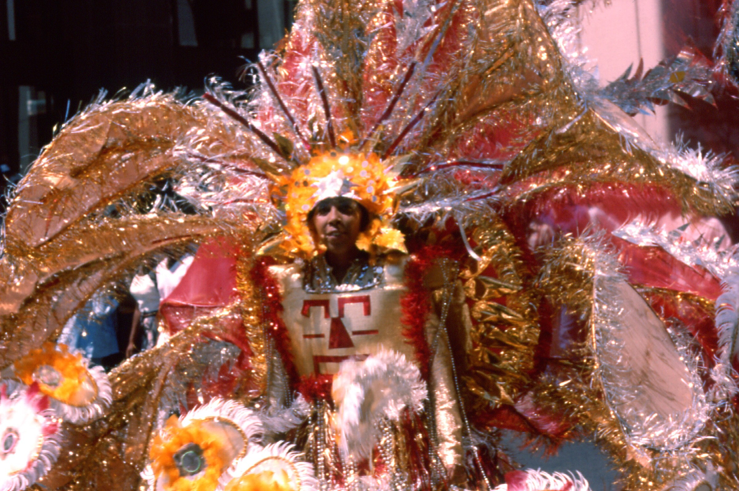 Caribana